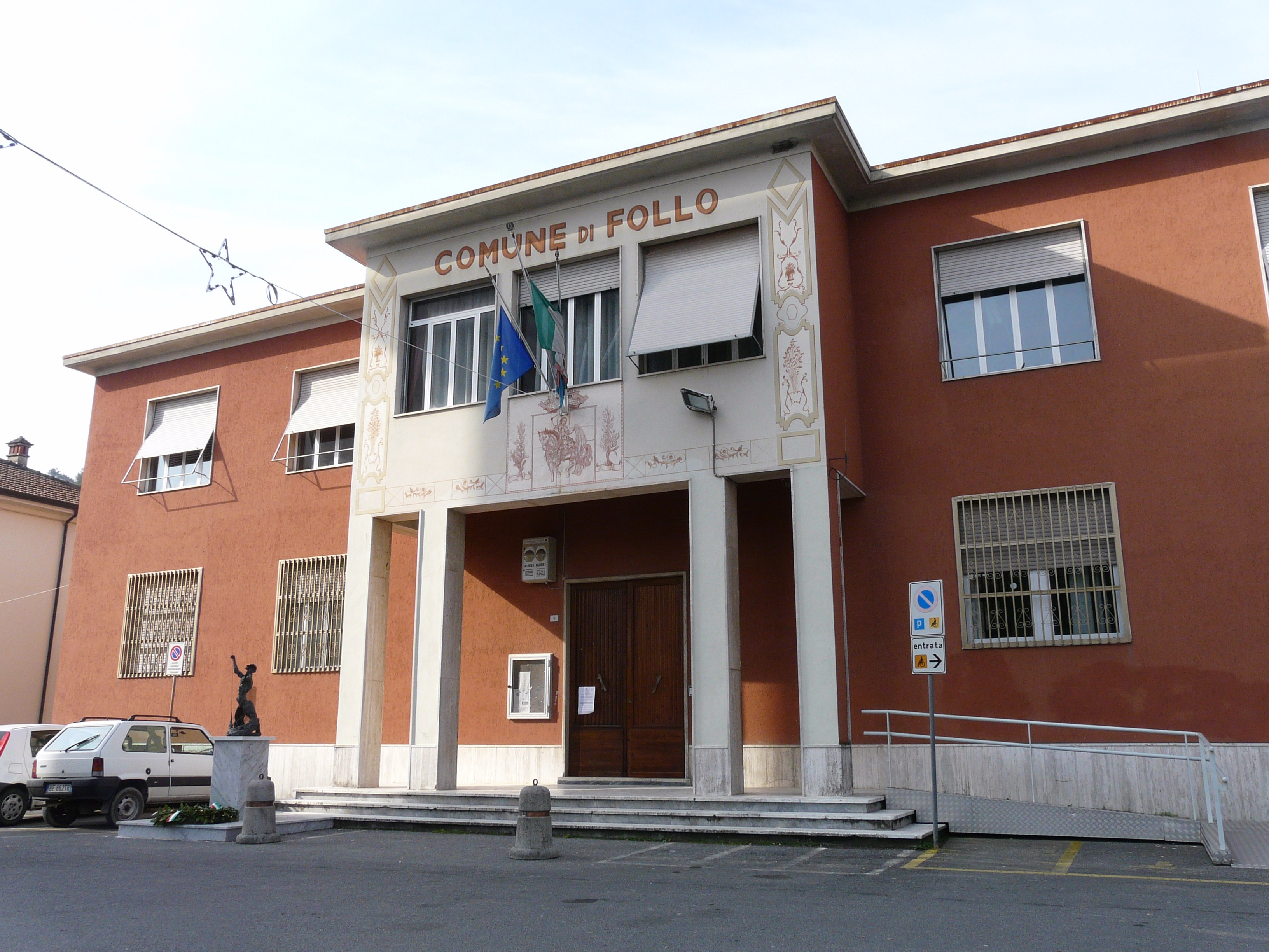 Municipio di Follo, Liguria, Italia